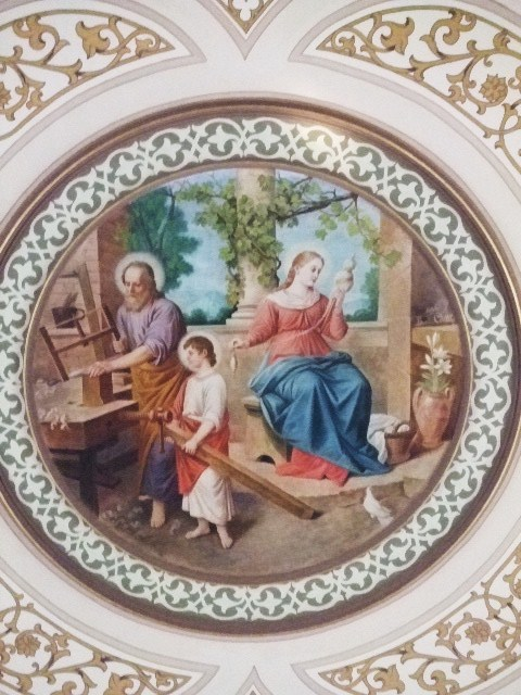 Pfarrkirche St. Michael, Kettershausen, Landkreis Unterallgäu Haus Nazareth